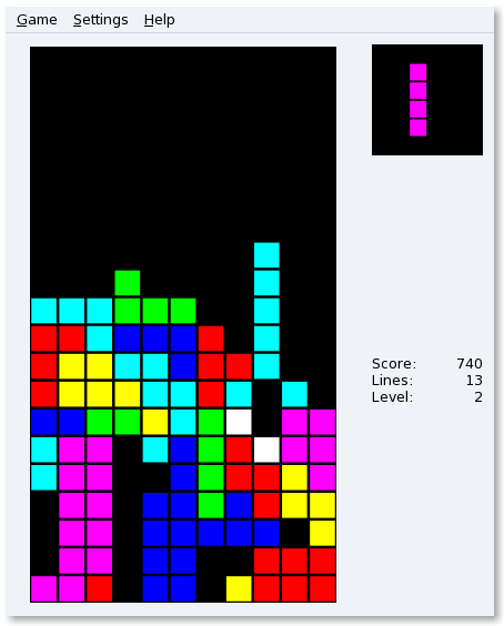 Una captura de pantalla que hice.